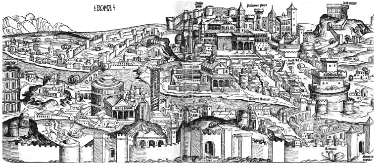 Roma nel 1493 - incisione di anonimo